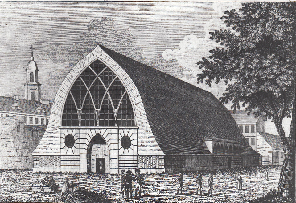 Berlin-Mitte, Exerzierhaus der Regomenter von Kunheim und von Winnig, erbaut 1799-1800. Stich von P. Haas nach L. Serrurier. - Charaktersitisch sind Bohlendach und neugotische Giebelfassade des Gebäudes.